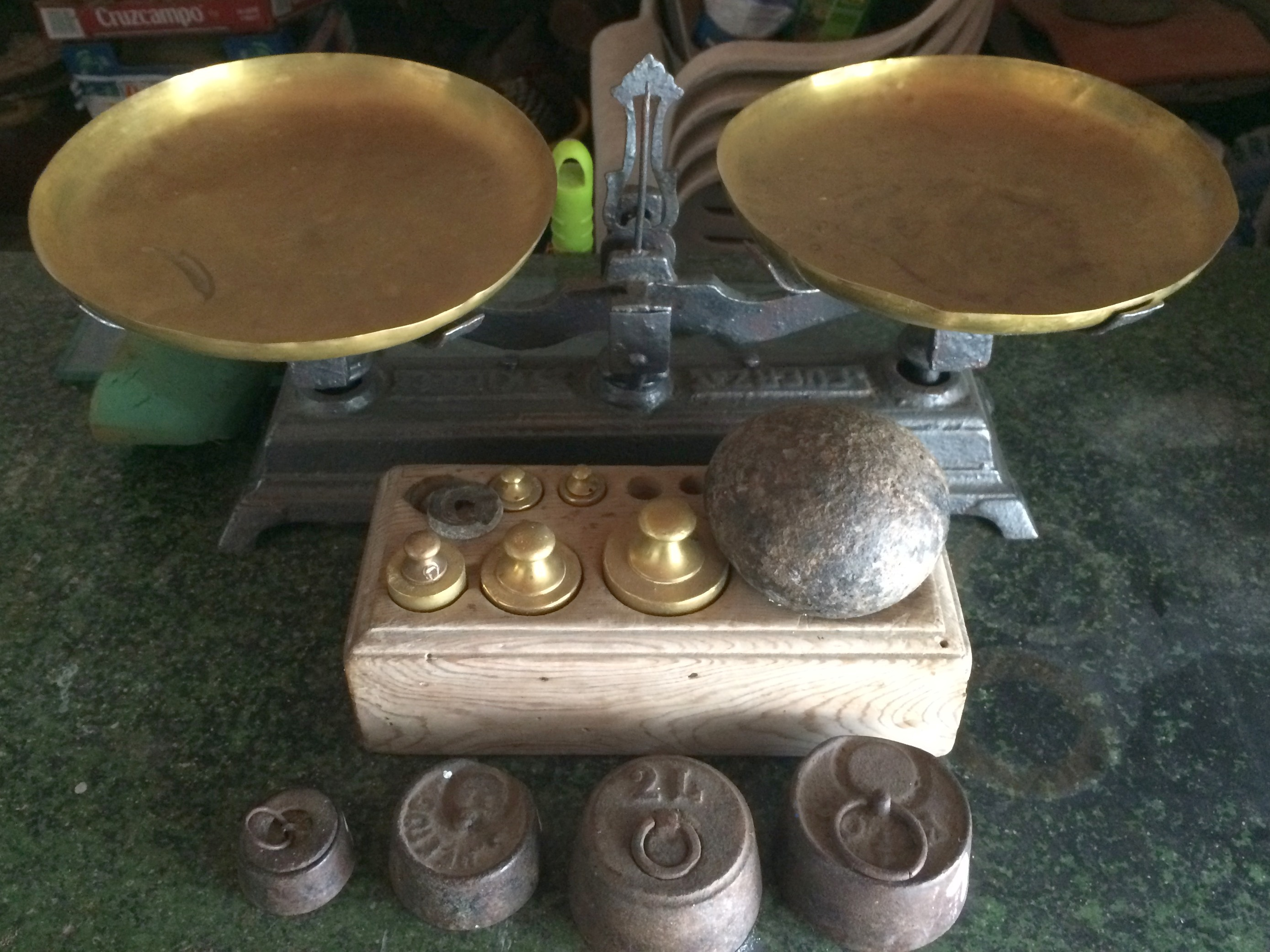 Balanza española antigua y varios juegos de pesas. Una de ellas, en primer plano está identificada con un "2 L" que debe significar dos libras castellanas. Fotografía tomada en Cabezas Rubias (provincia de Huelva), colección particular.